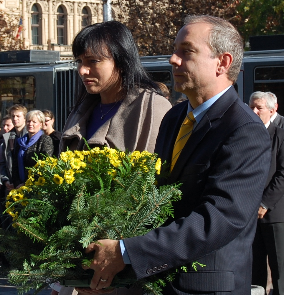 Klára Liptáková a Jiří Mihola